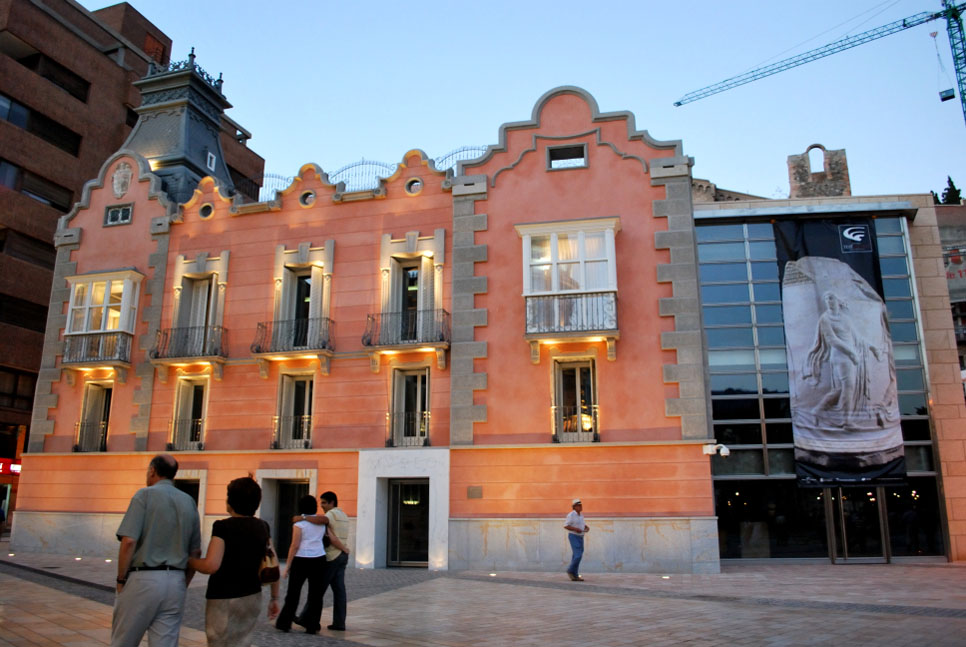 Museo del Teatro Romano de Cartagena. Entrada principal a través del antiguo palacete Pascual de Riquelme.